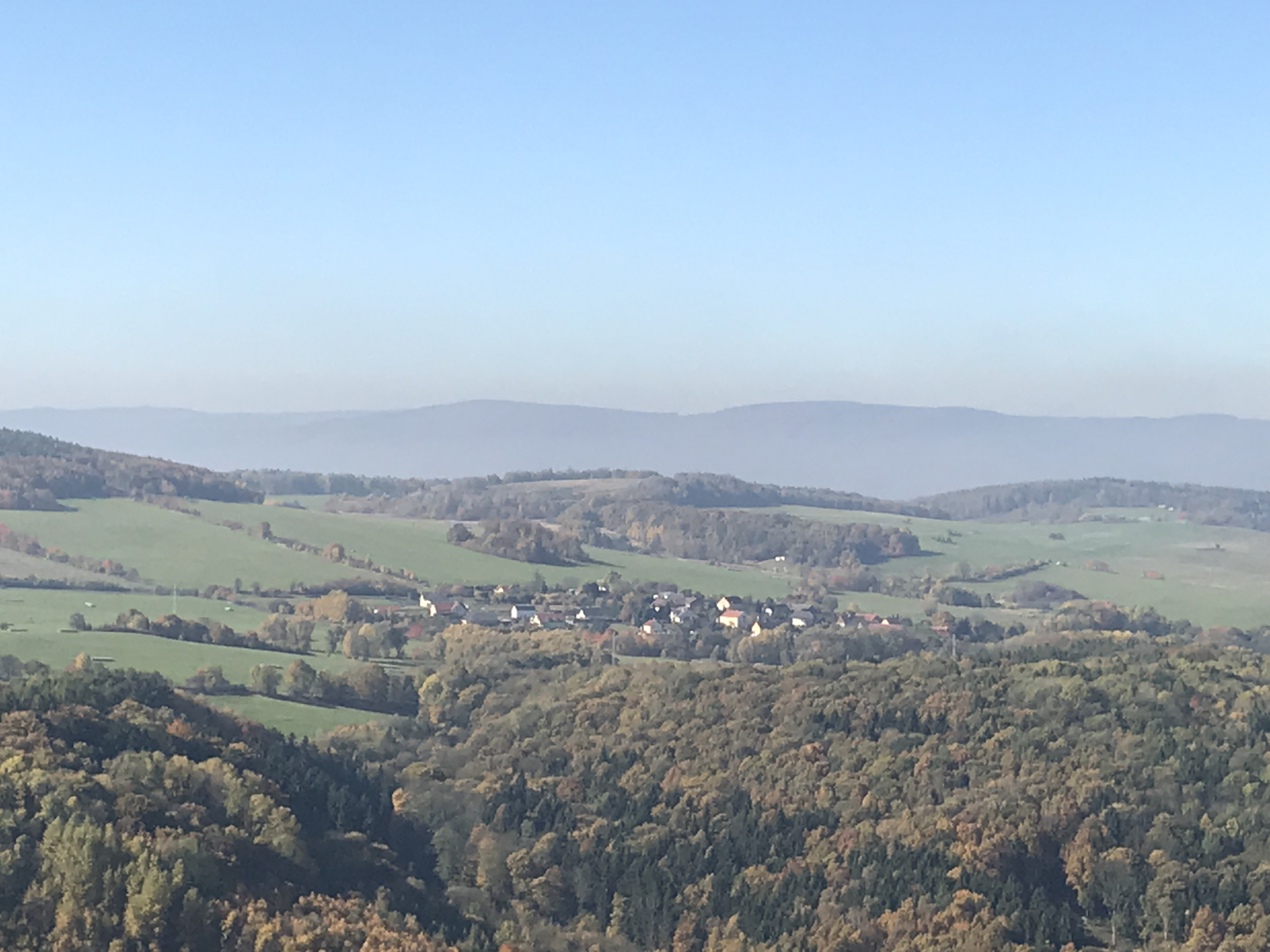 Radešín